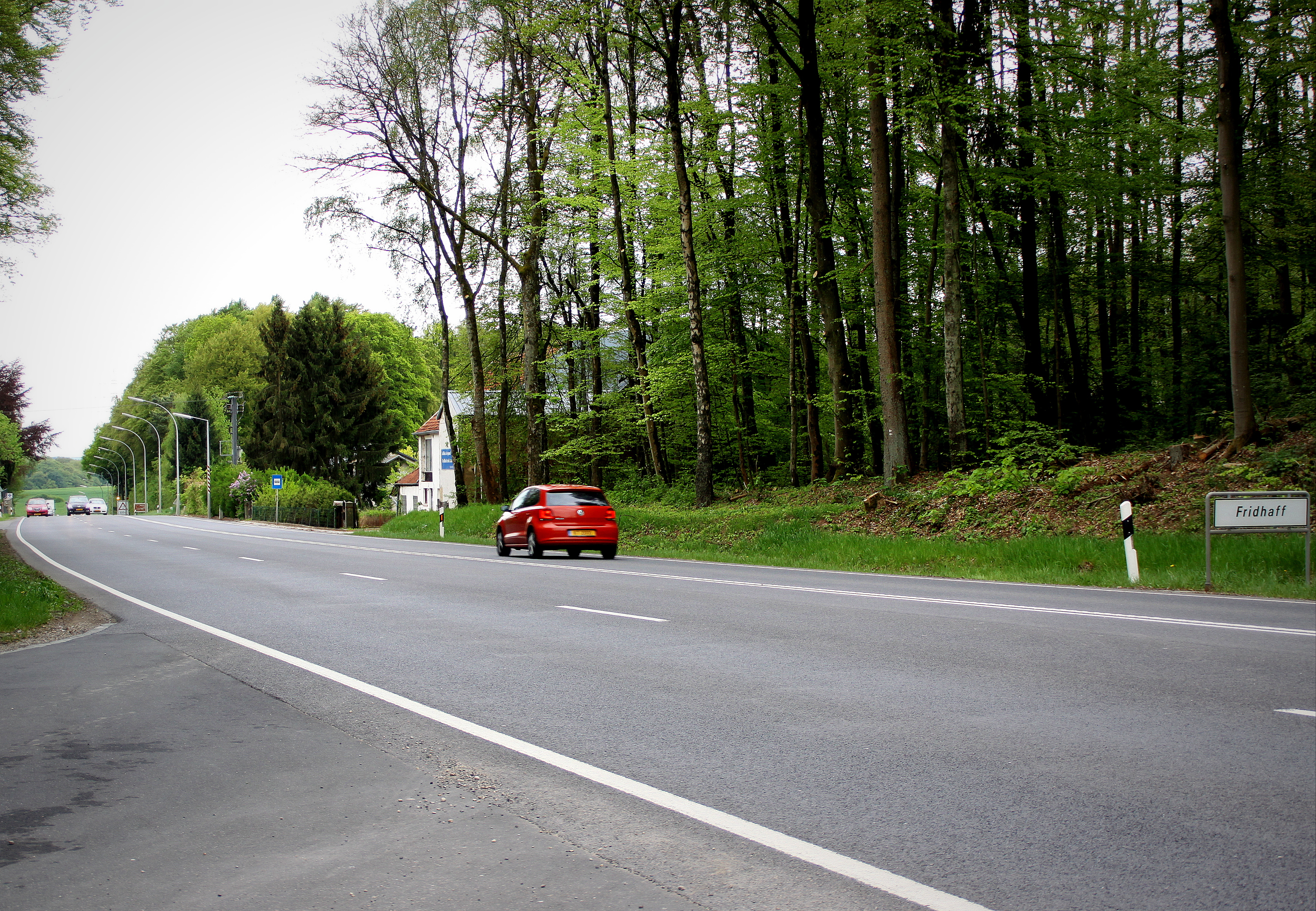 Um Fridhaff 2014